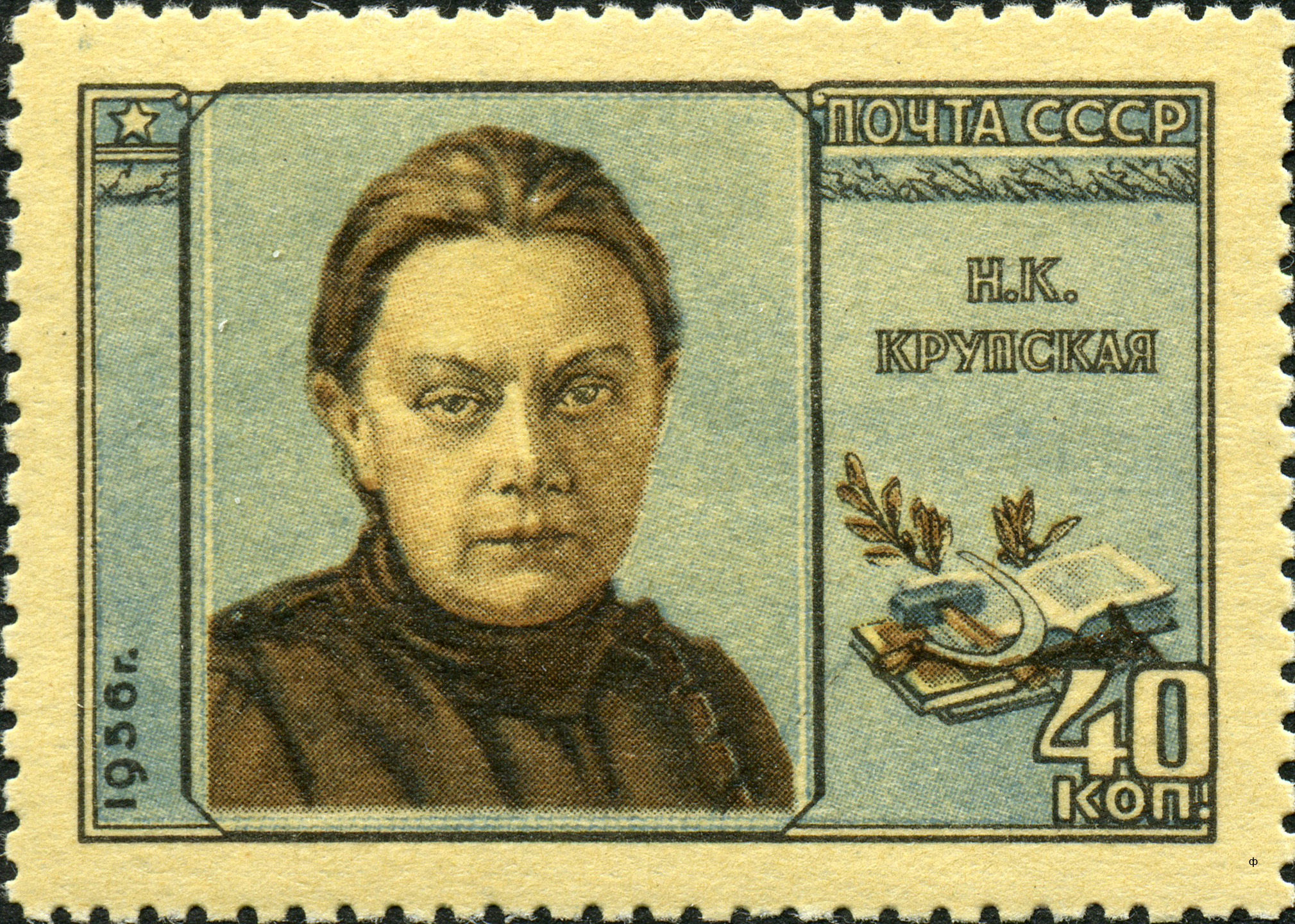 Н. К. Крупская, Марка Союза ССР, 1956 год, 40 копеек.